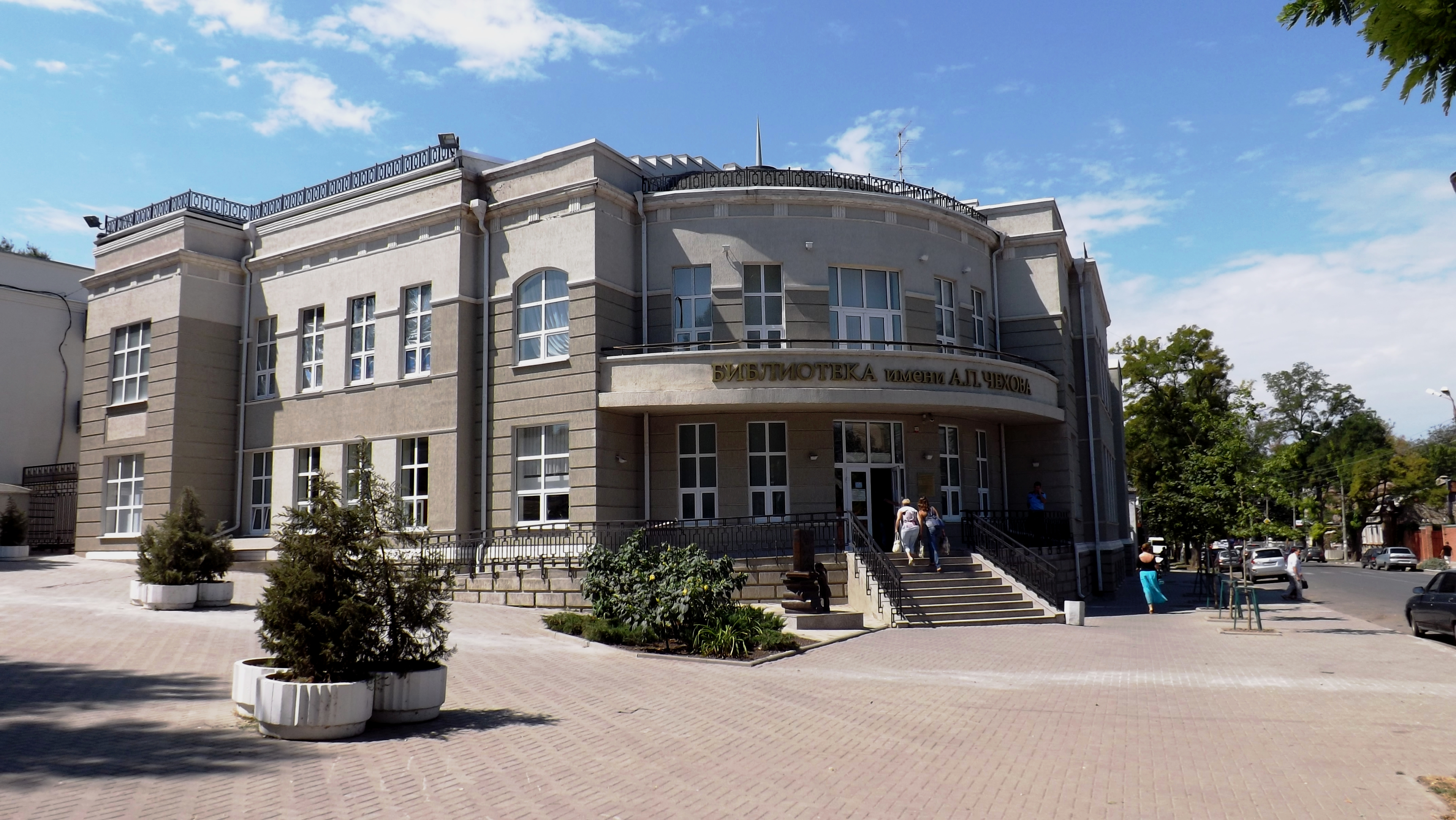 Таганрог. Билиотека им.А.П.Чехова.Вид с улицы Греческой (бывш.улица III-го Интернационала)